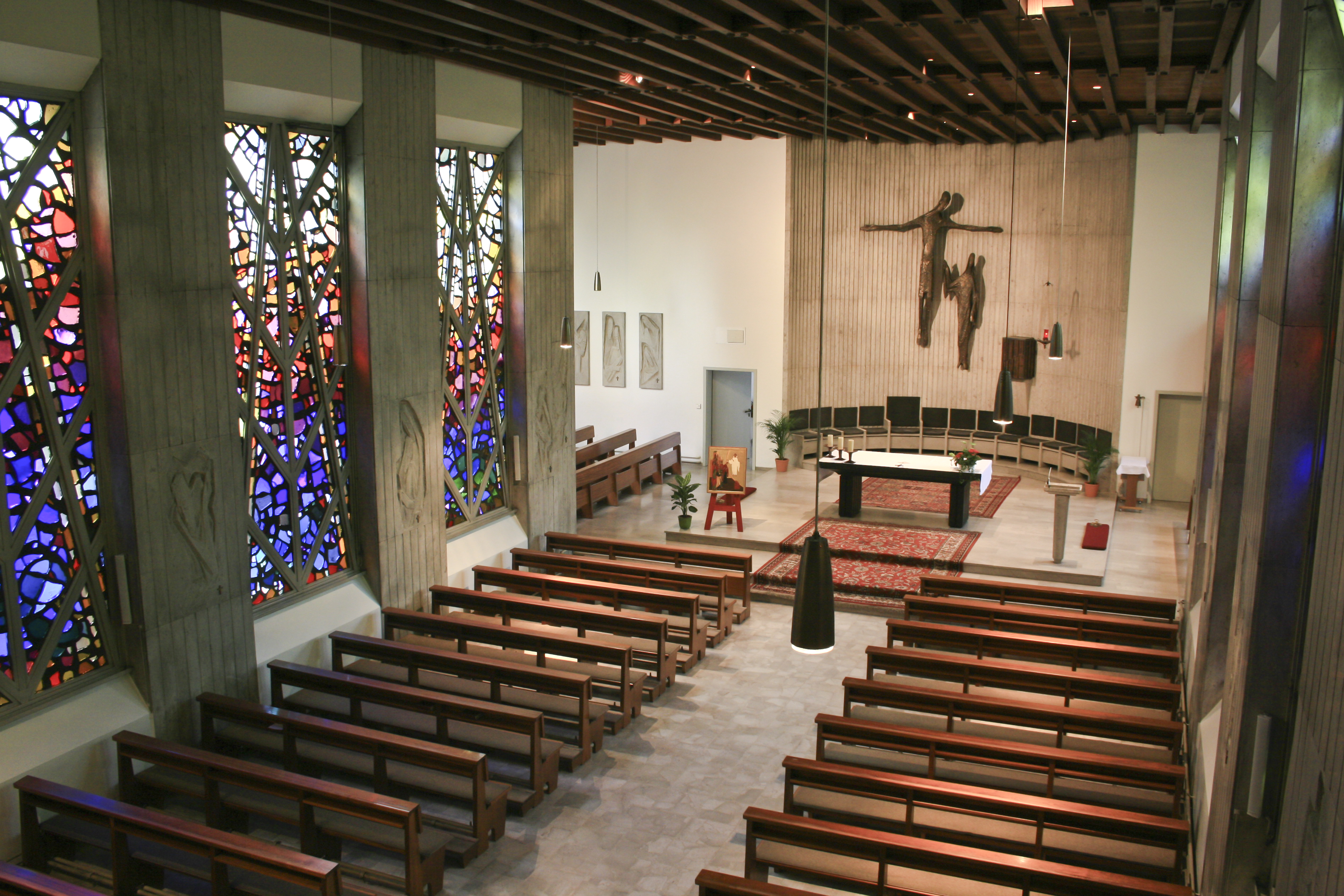 Provinzialat der Herz Jesu Missionare Salzburg